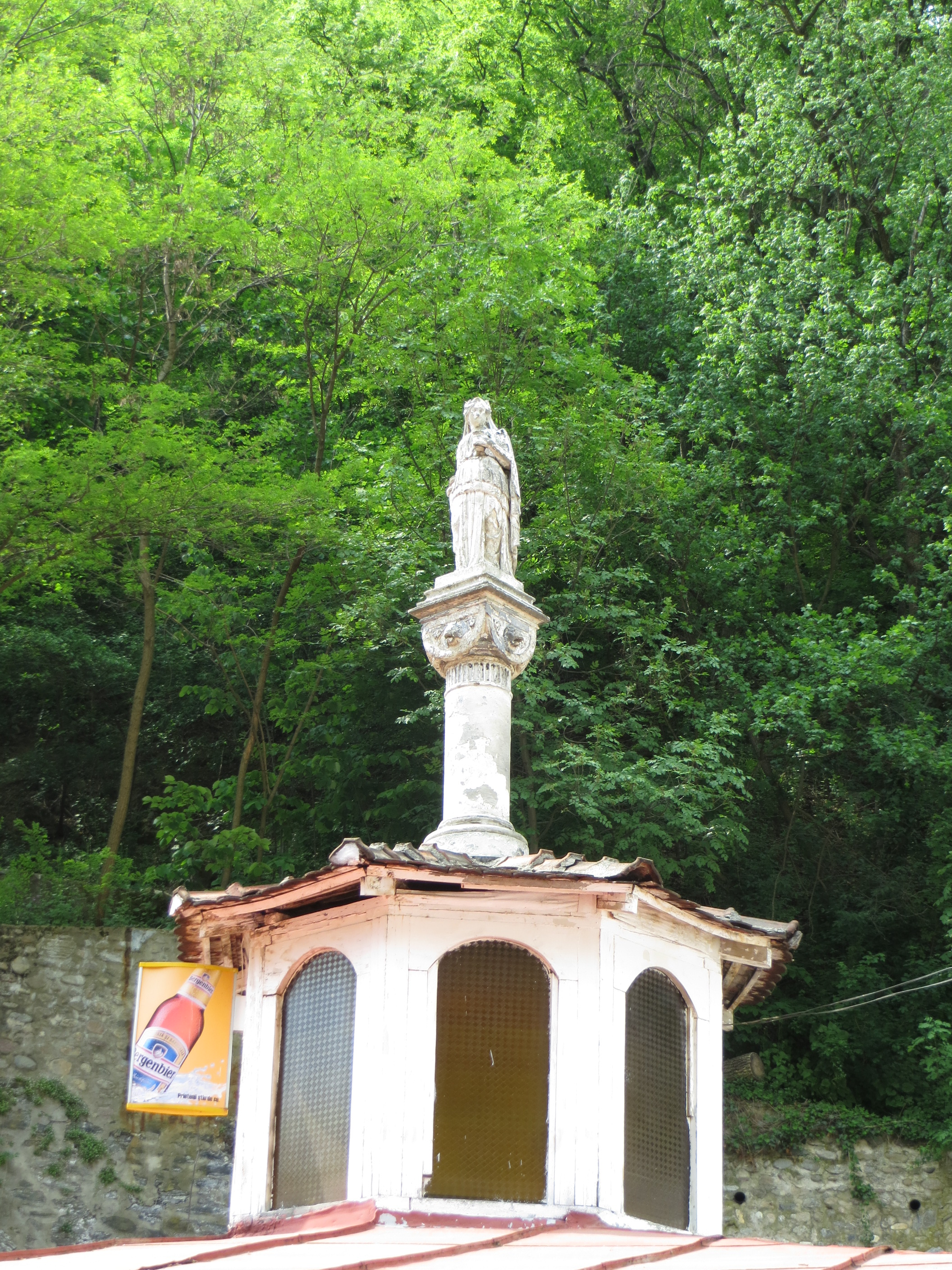 Statuia zeiței Diana